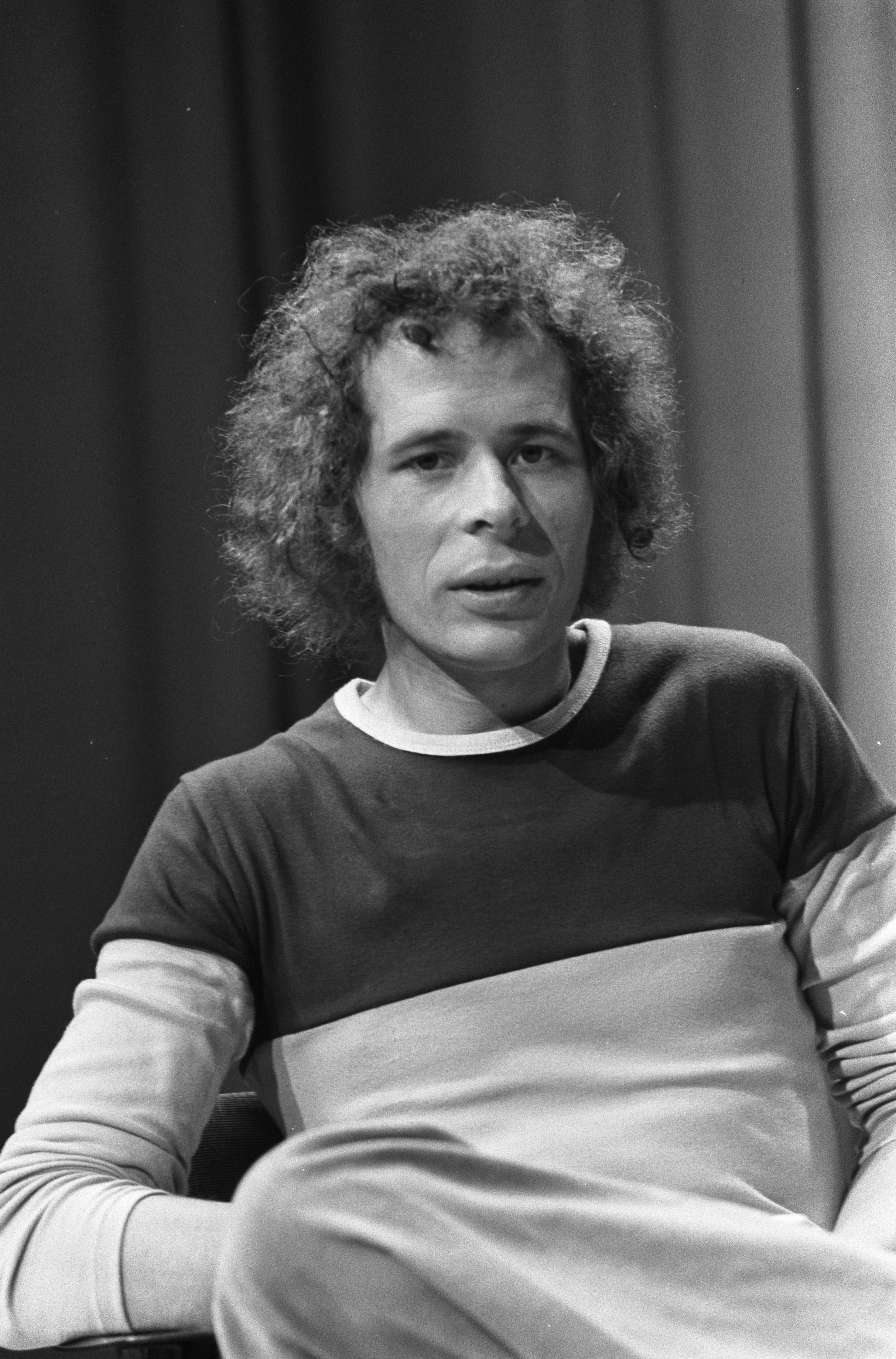 Collectie / Archief : Fotocollectie Anefo Reportage / Serie : [ onbekend ] Beschrijving : "Nederpopzien", Rudolf Lucieer (kop) Datum : 9 april 1974 Trefwoorden : portretten Fotograaf : Punt, […] / Anefo Auteursrechthebbende : Nationaal Archief Materiaalsoort : Negatief (zwart/wit) Nummer archiefinventaris : bekijk toegang 2.24.01.05 Bestanddeelnummer : 927-1199